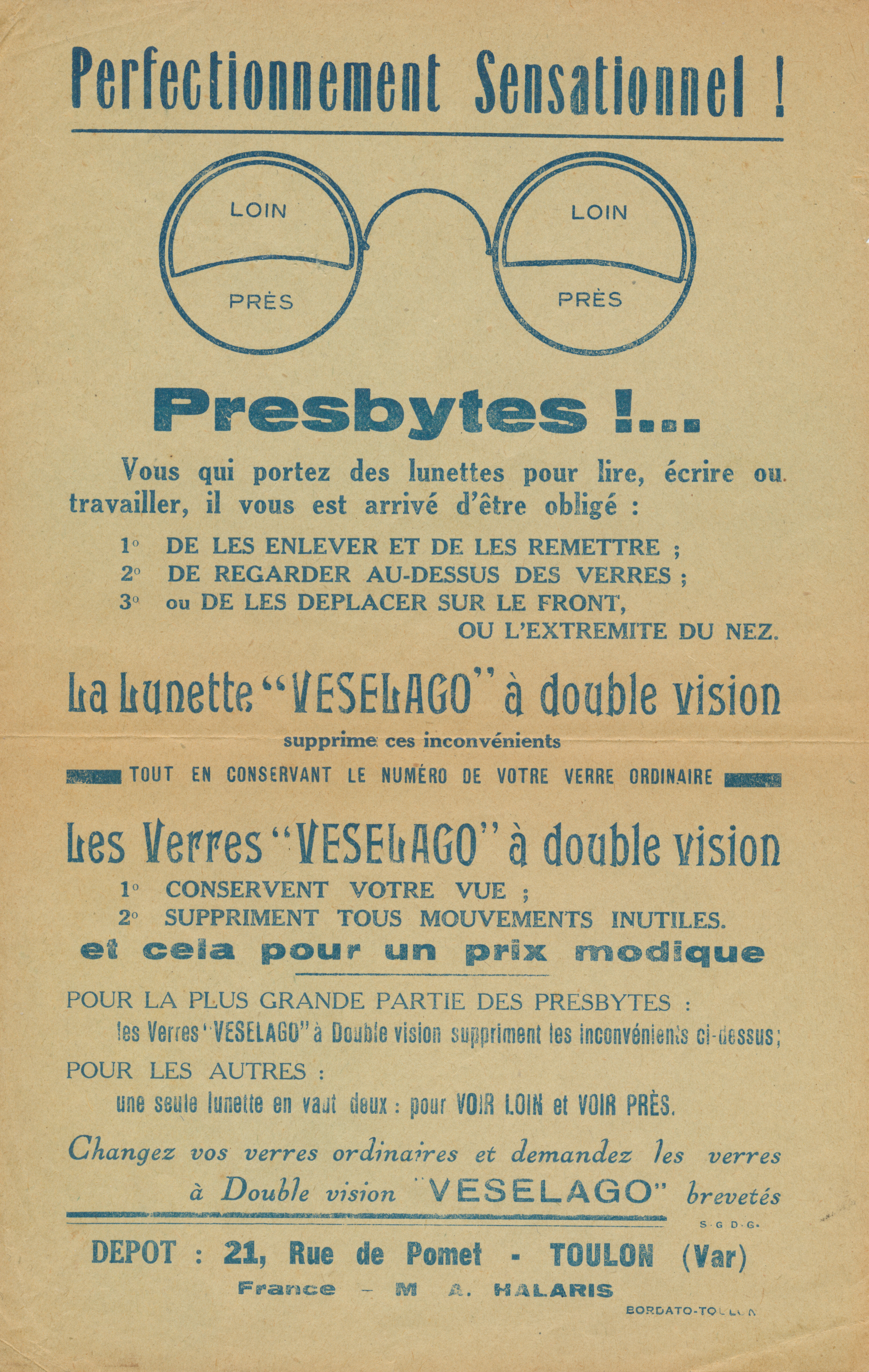 Бифокальные очки доктора Василия Веселаго (1882—...). Веселаго Василий Сергеевич окончил фельдшерскую школу в Кронштадте, служил на флоте в Севастополе и в Мариупольском уезде (станция Волноваха) в чине губернского секретаря. Эмигрировал в 1919 году. Как врач участвовал во французском Сопротивлении.